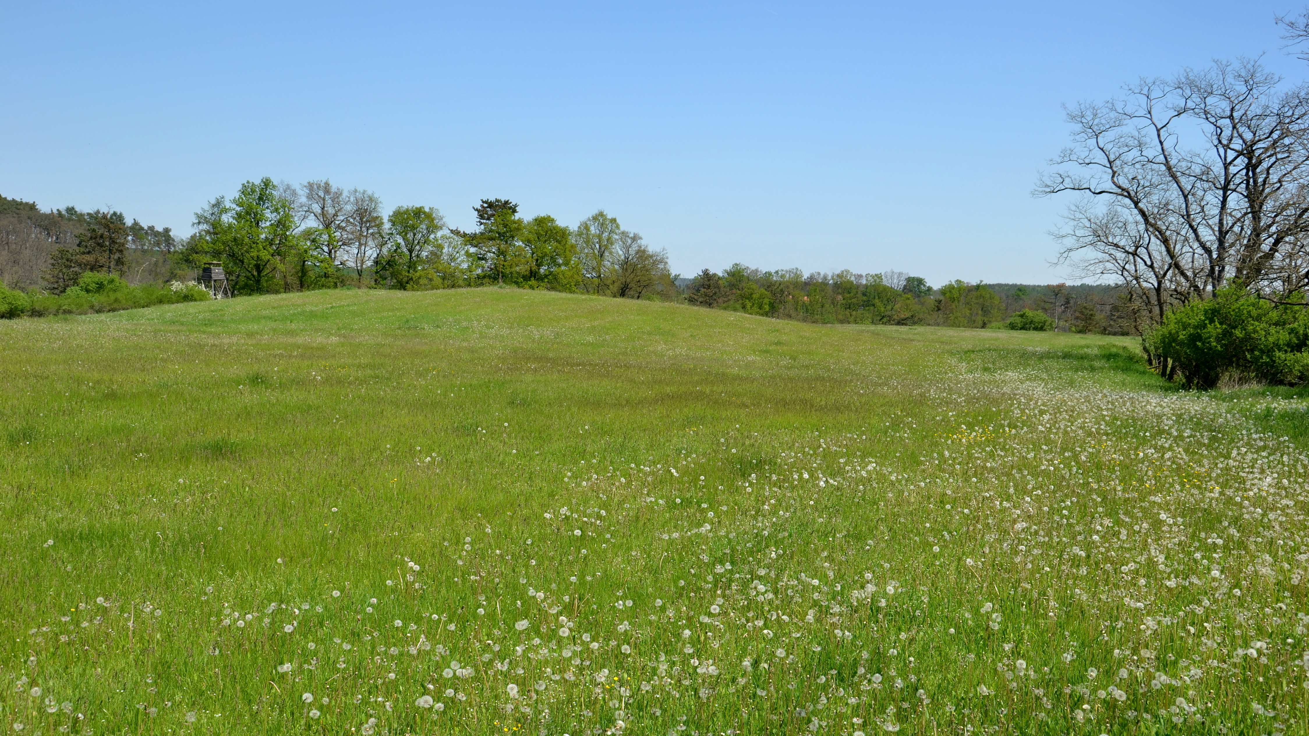 Dolní Hradiště – vnitřní val slovanského hradiště dochovaný v podobě terénní vlny